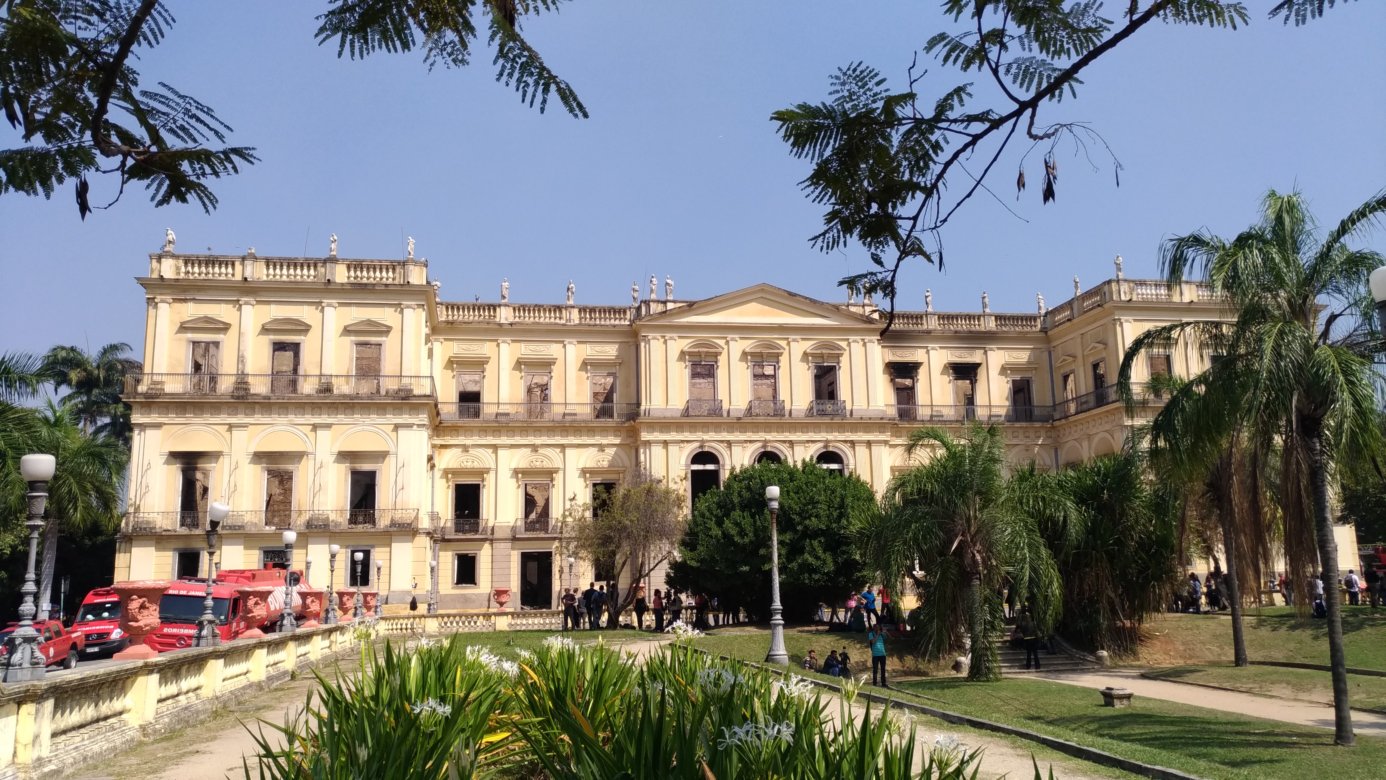 Fachada do museu, com jornalistas